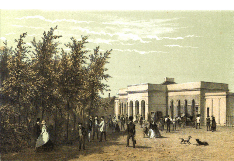 Illustratie gemaakt door Gerardus Johannes Bos voor het album De Stad Leiden : Album bevattende eenige afbeeldingen der voornaamste hoofdgebouwen en fraaiste gezigten in en nabij de stad Leiden. eerste Serie. Auteur: A Montagne; G J Bos; Uitgever: Leiden Couvée (1859).